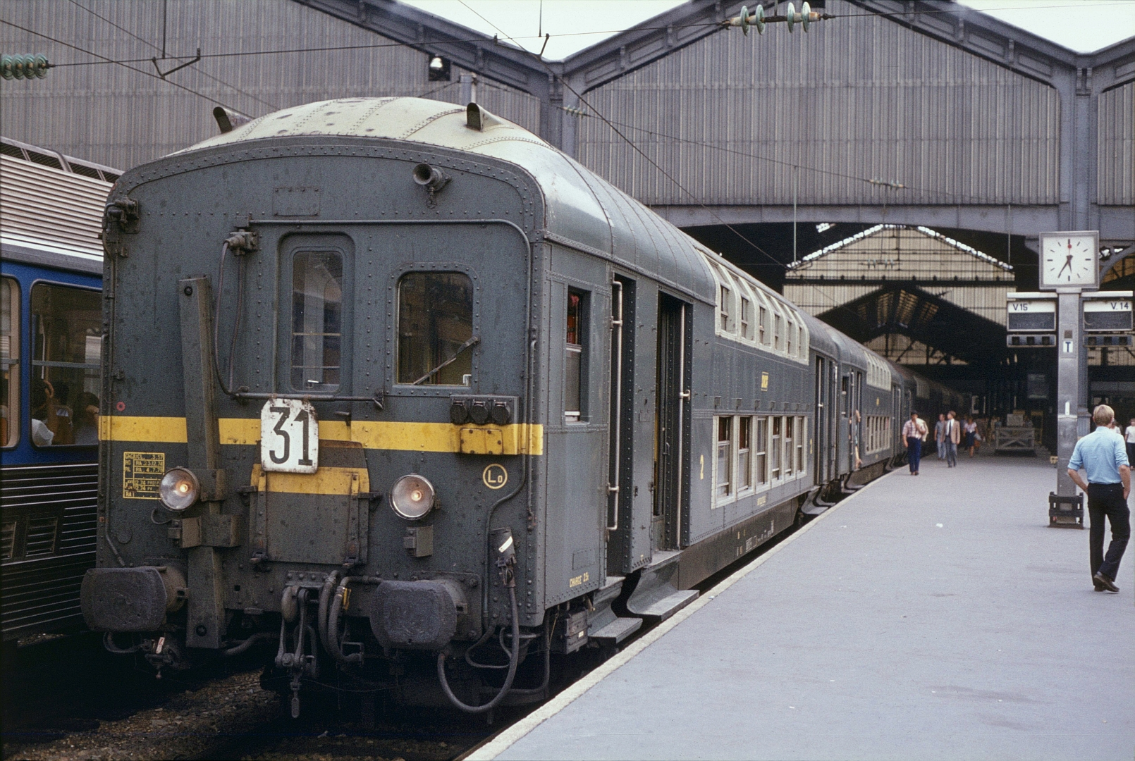 Un train de banlieue composé de voitures à deux niveaux ex-Etat, attend le départ en gare de Paris-Saint-Lazare le 17 septembre 1982.